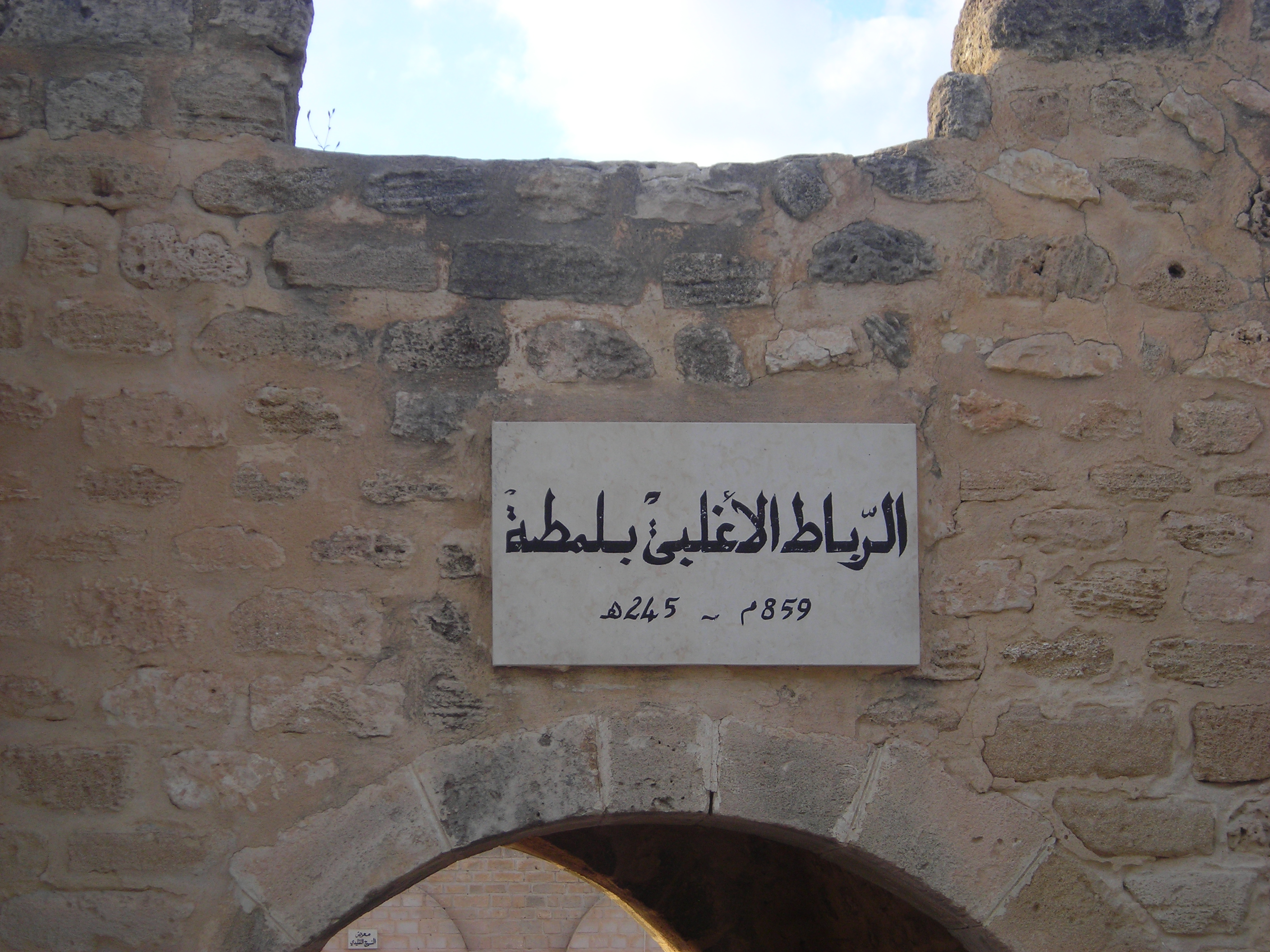 Ribat Aghlabite Lamta